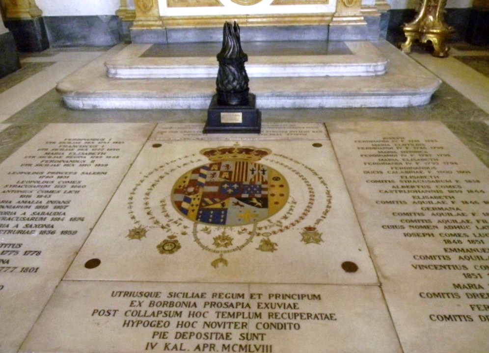 Basilica di Santa Chiara (Napoli) - Cappella dei Borbone, lo stemma sul pavimento.